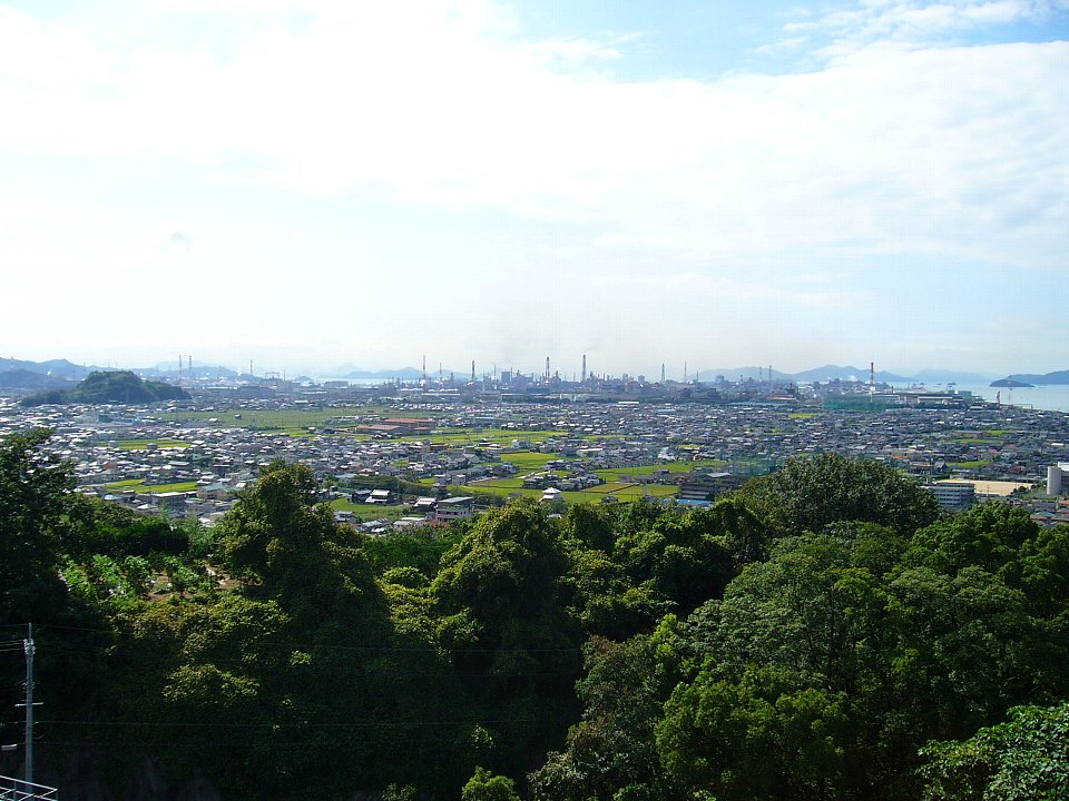 倉敷芸術科学大学付近（連島町）から水島地区を遠望